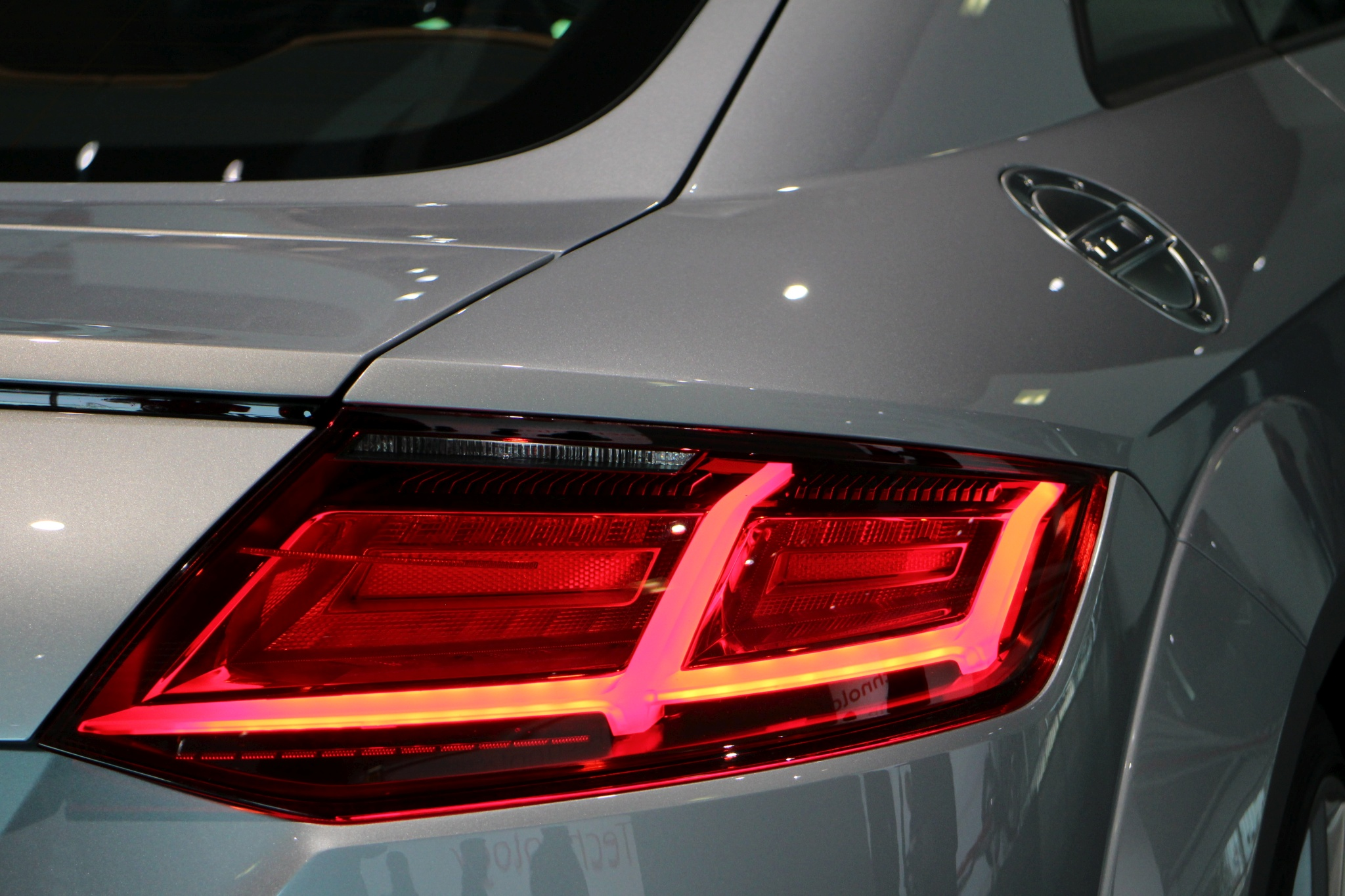 das dritte TT Modell